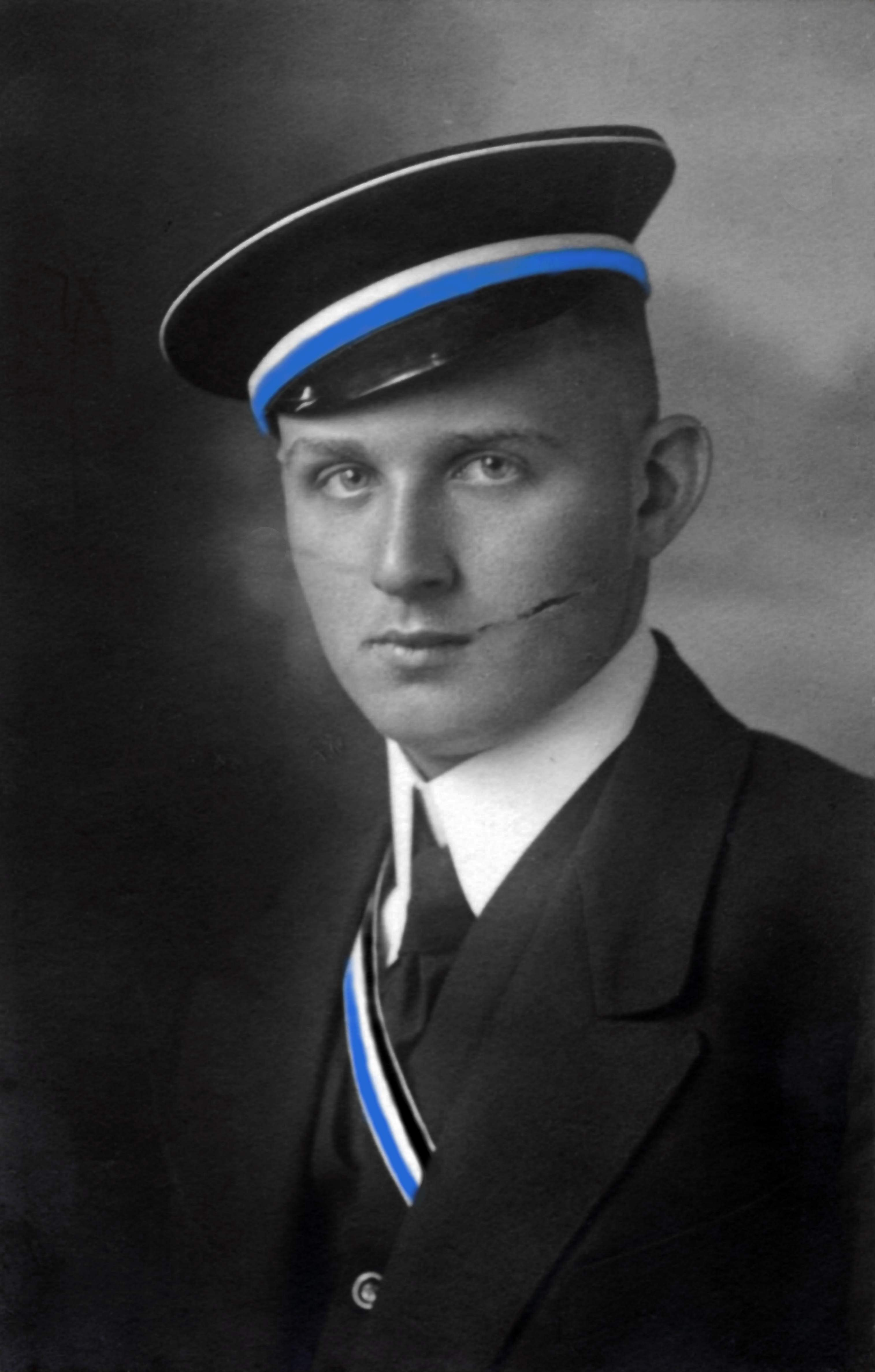 Porträtfotografie von Arthur Rühl